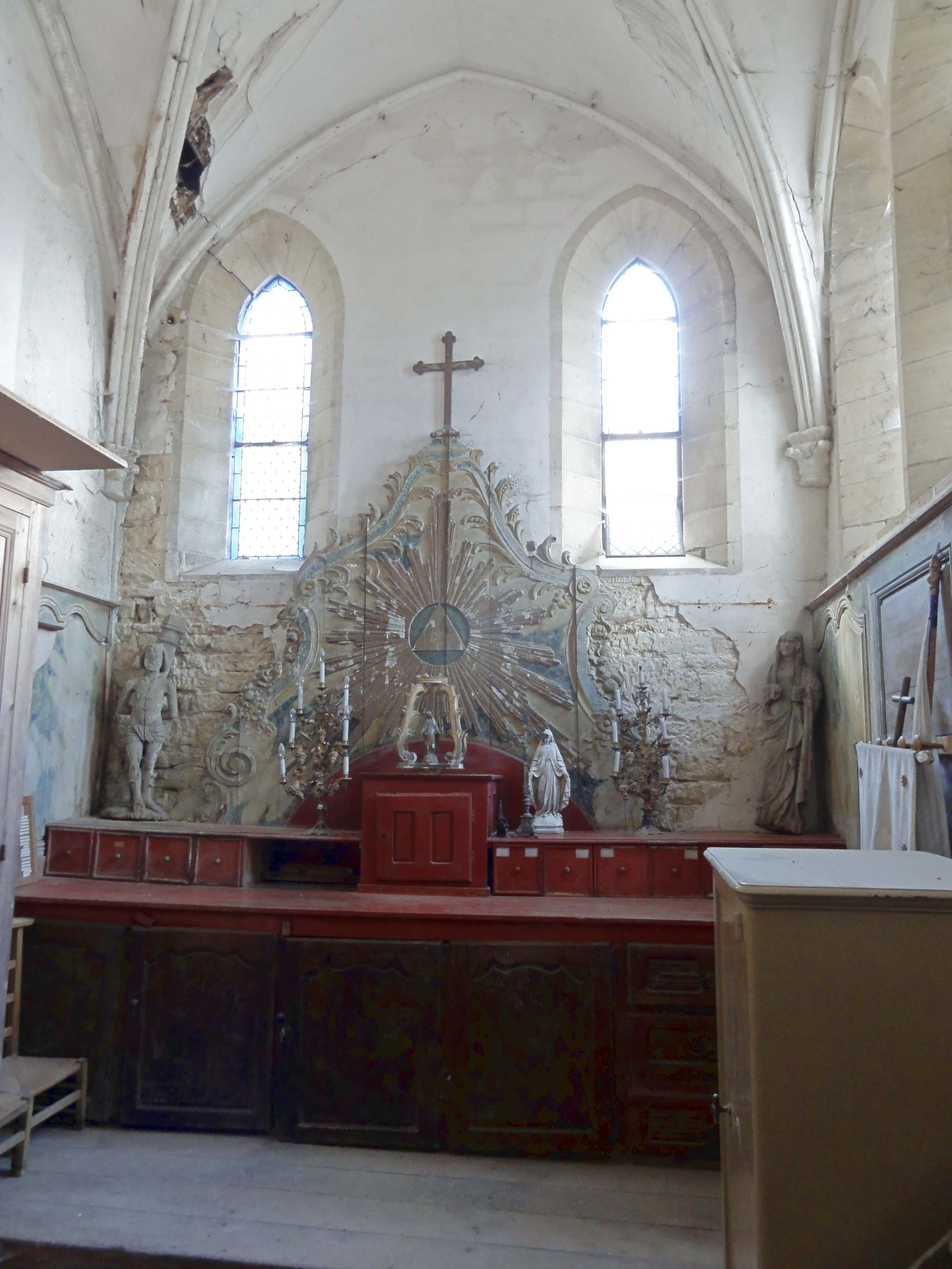 Sacristie, vue vers le nord.